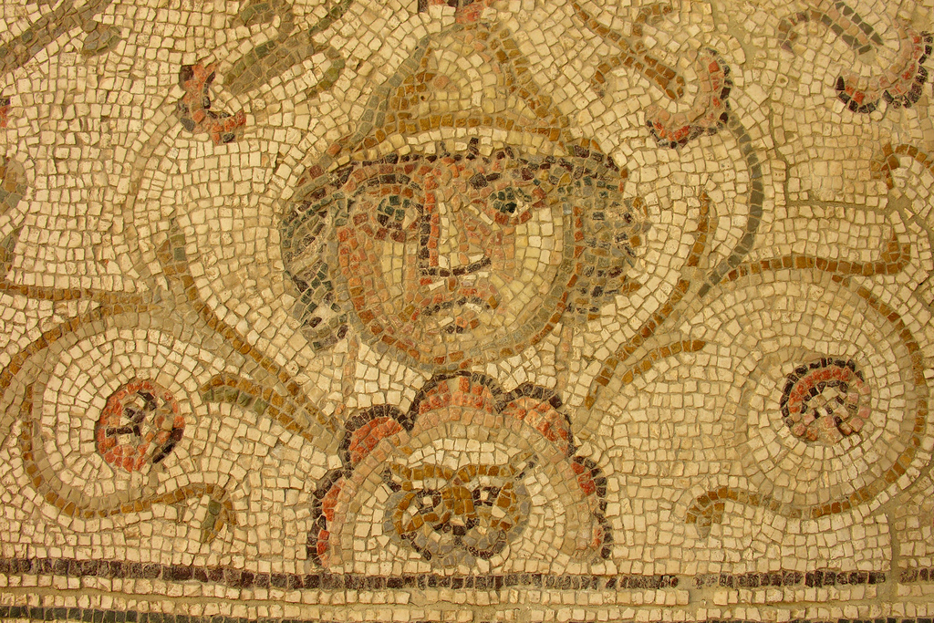 Mosaico romano en Ecija, Sevilla, Andalucía, España